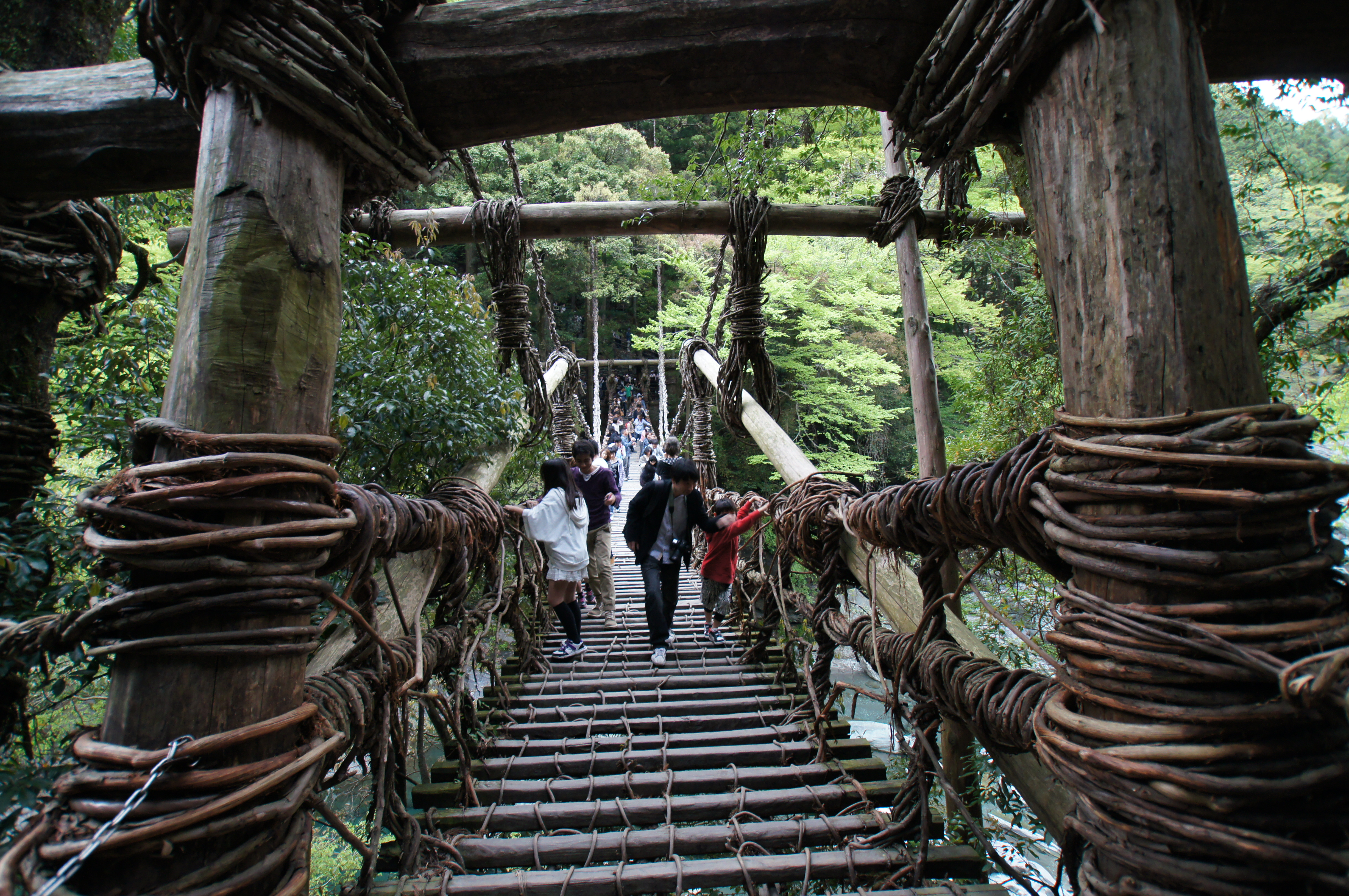 祖谷の蔓橋 Iya Kazurabashi